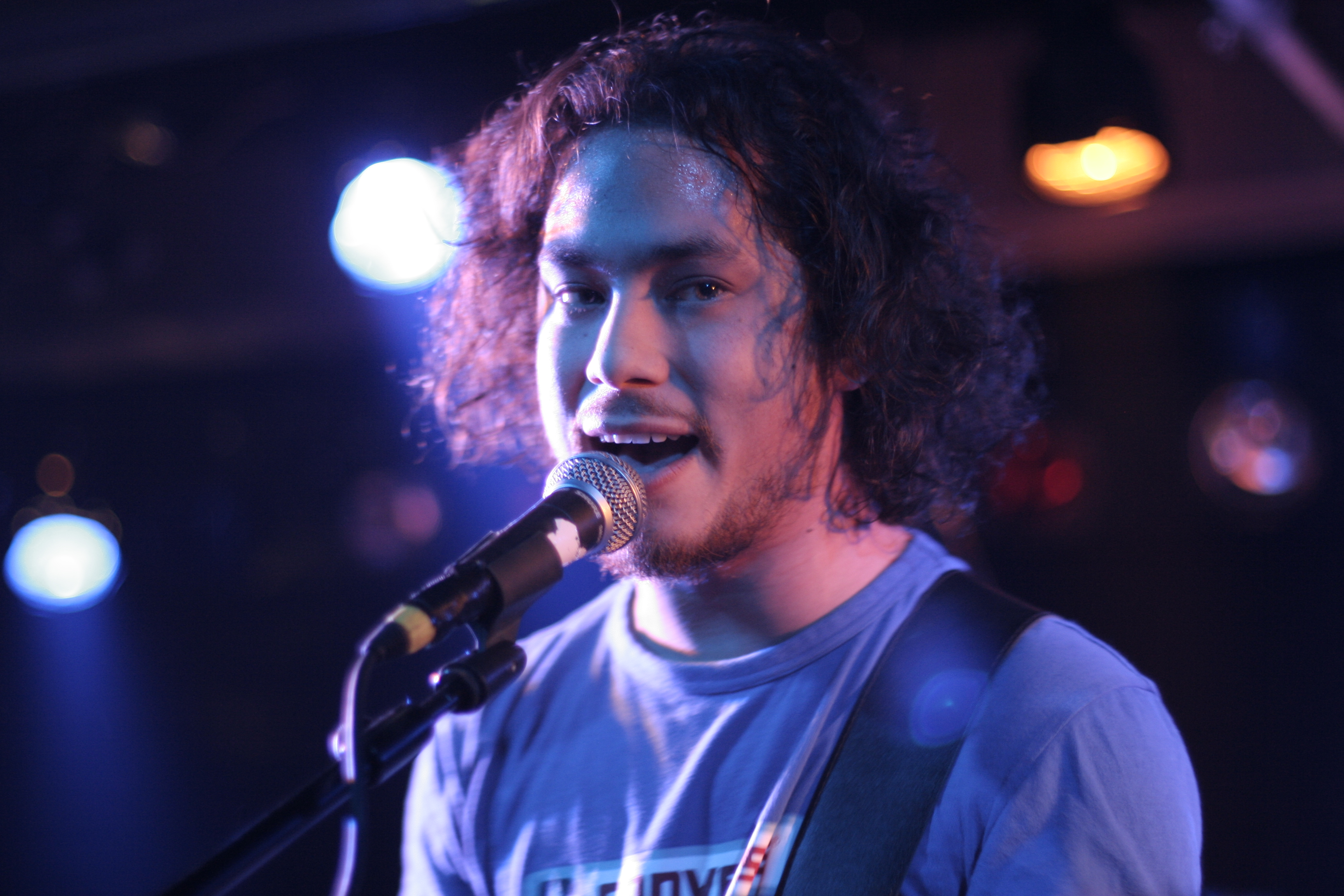 Green Lizard